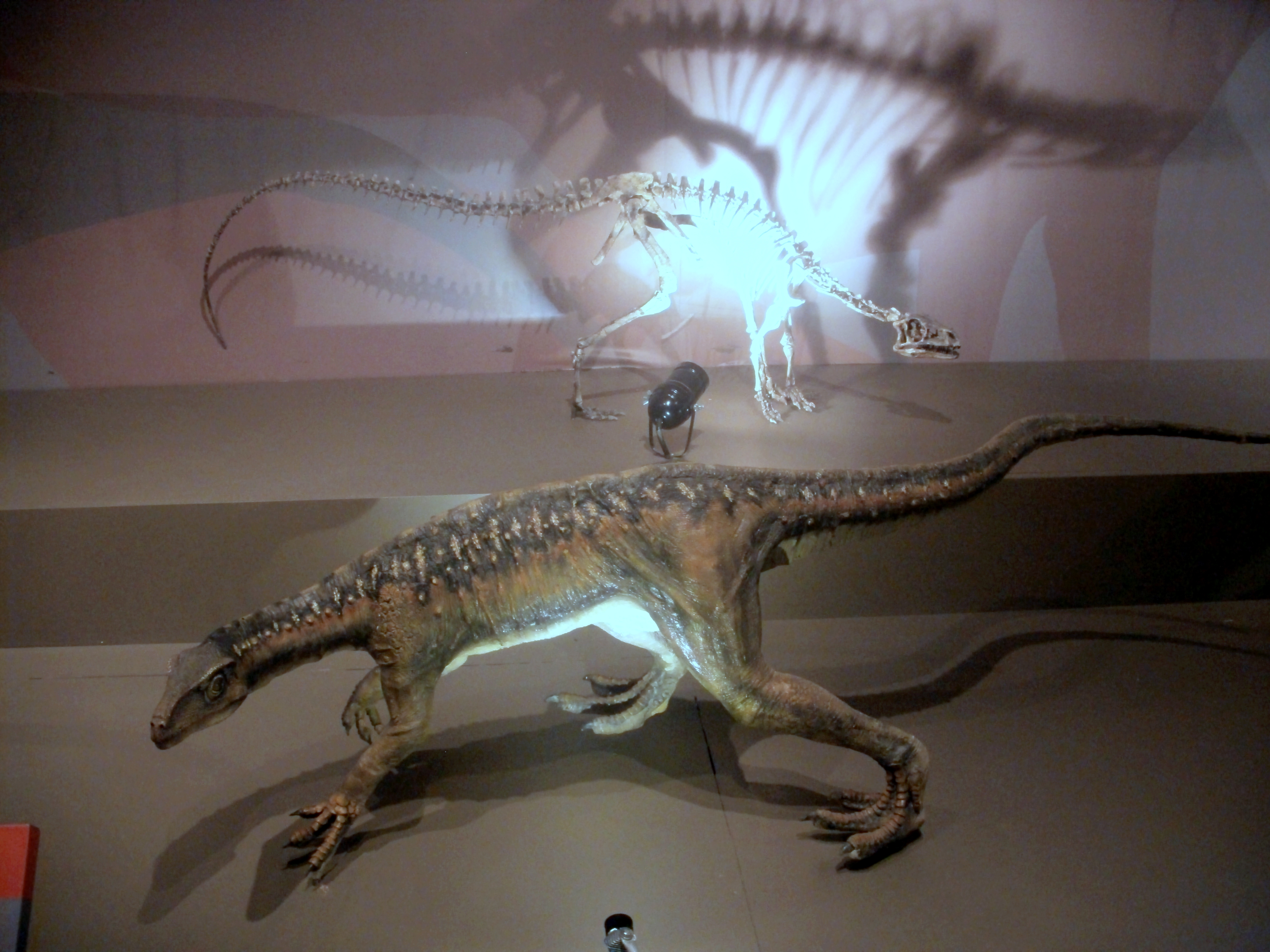 Recreación paleoartística de la locomoción del carnivoro